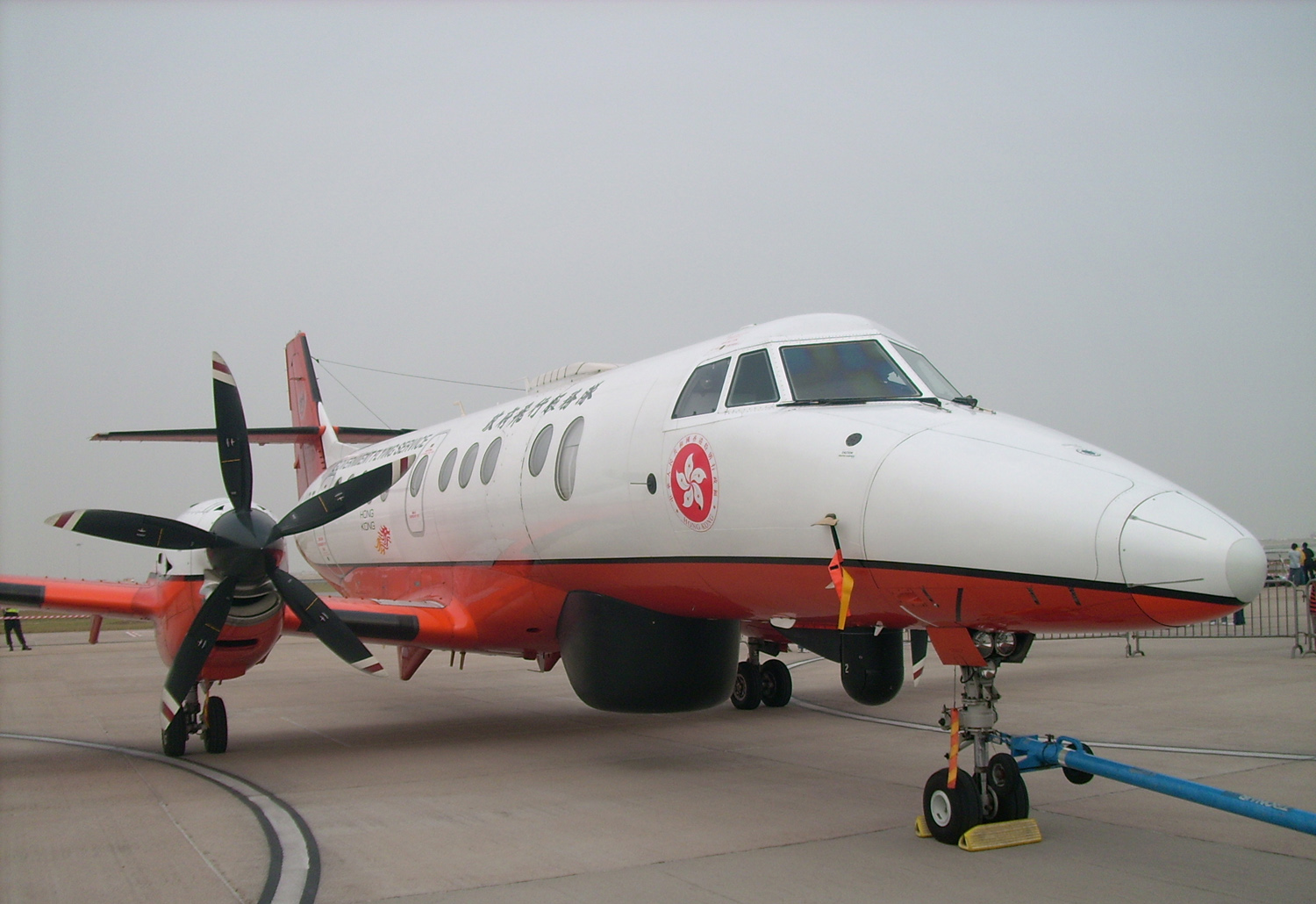 HKGFS Jetstream-41